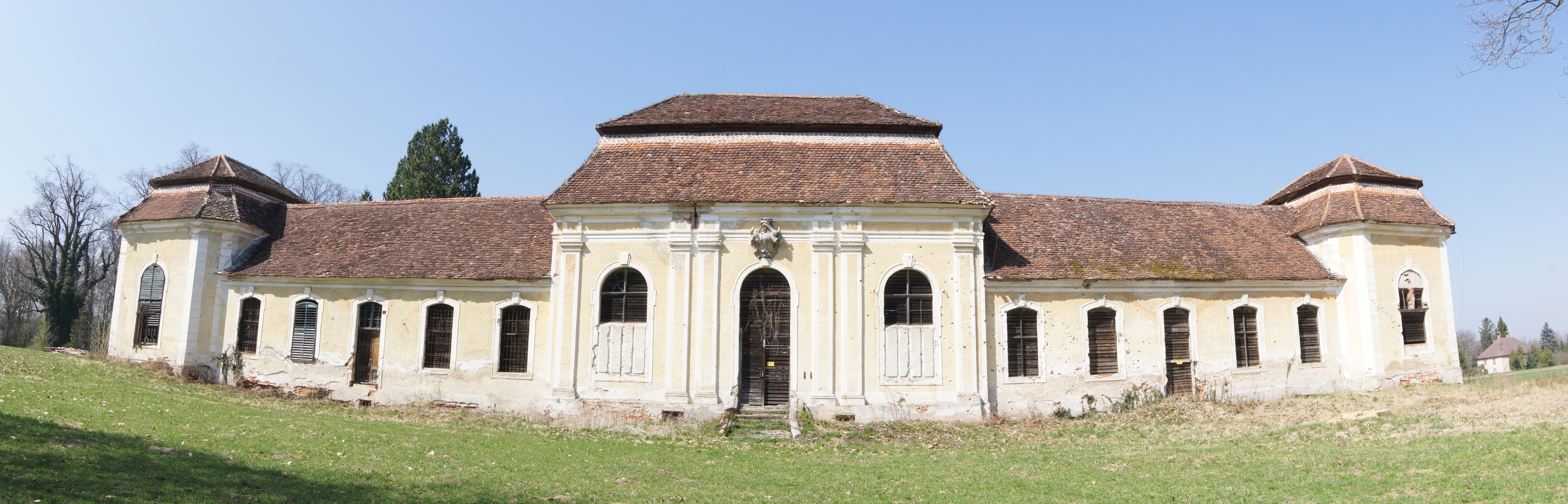 Die ehemalige Orangerie beim Schloss Friedau